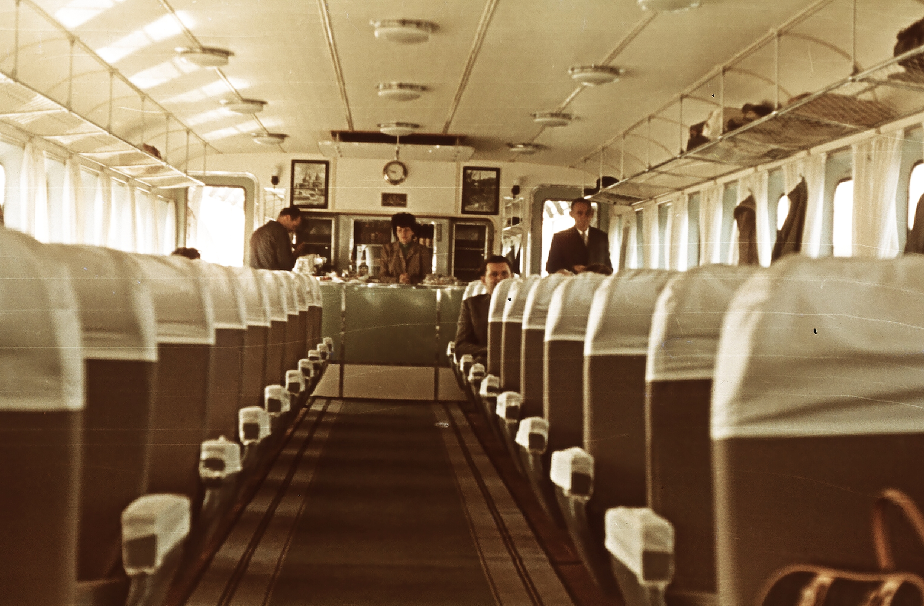 Sirály szárnyashajó. Location: Hungary Tags: ship, hydrofoil, Sirály I. ship, colorful Title: Sirály szárnyashajó.